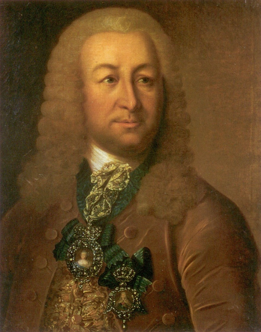 Иоганн Герман Лесток (1692-1767), граф , ДТС, придворный медик.